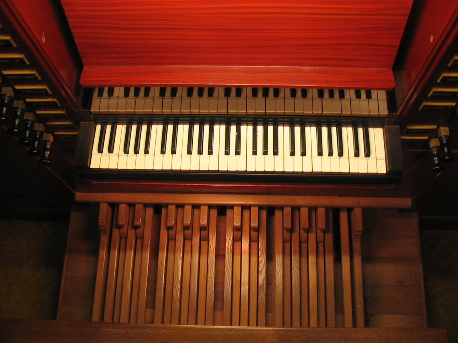 Pedaal orgel dorpskerk Katwijk